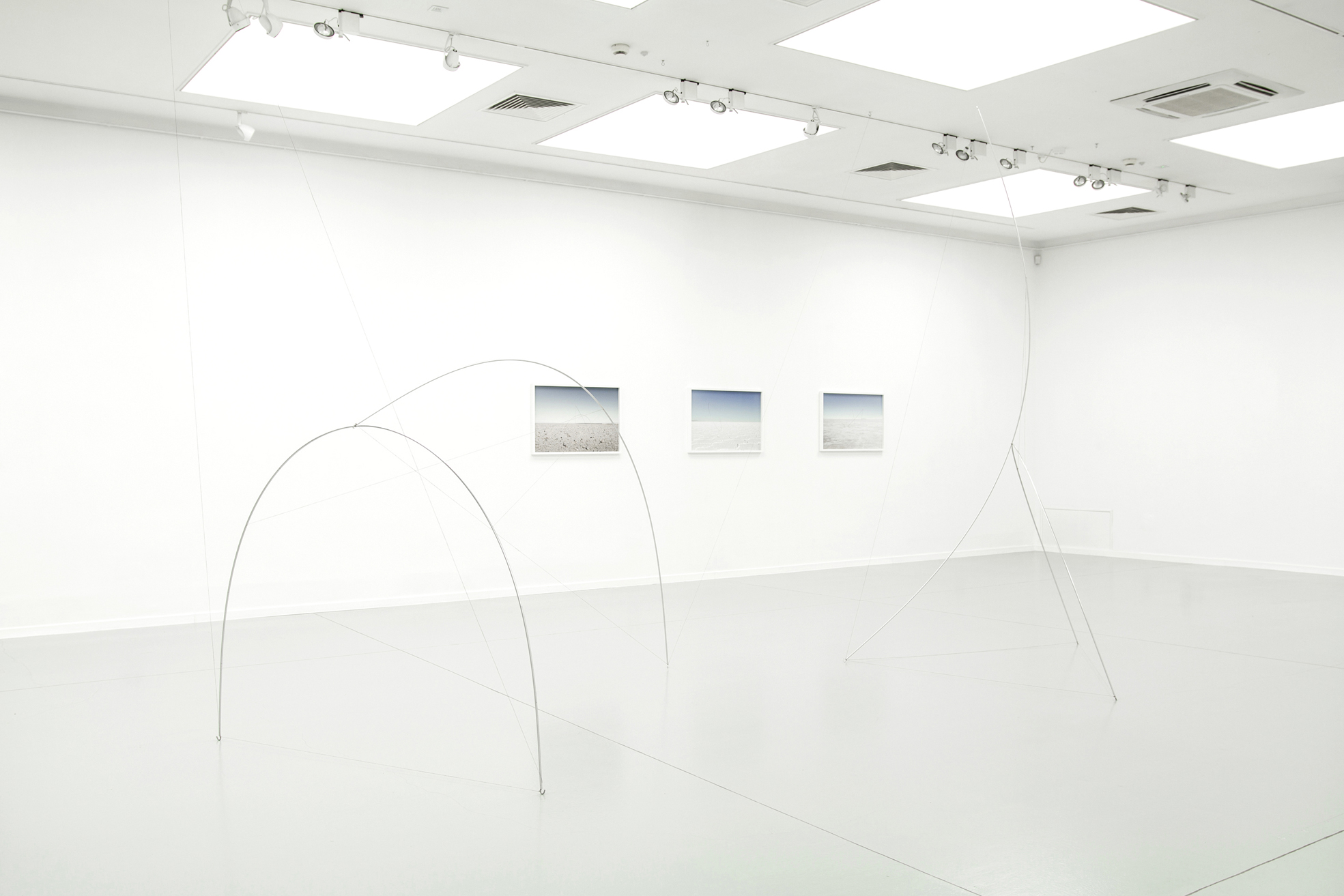 Michał Smandek, Wywoływanie rzeźby, Szkielety, widok wystawy, Galeria Miejska BWA w Bydgoszczy, 2018